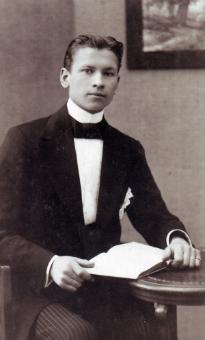 Geror Jurkowski, Portrait 1914